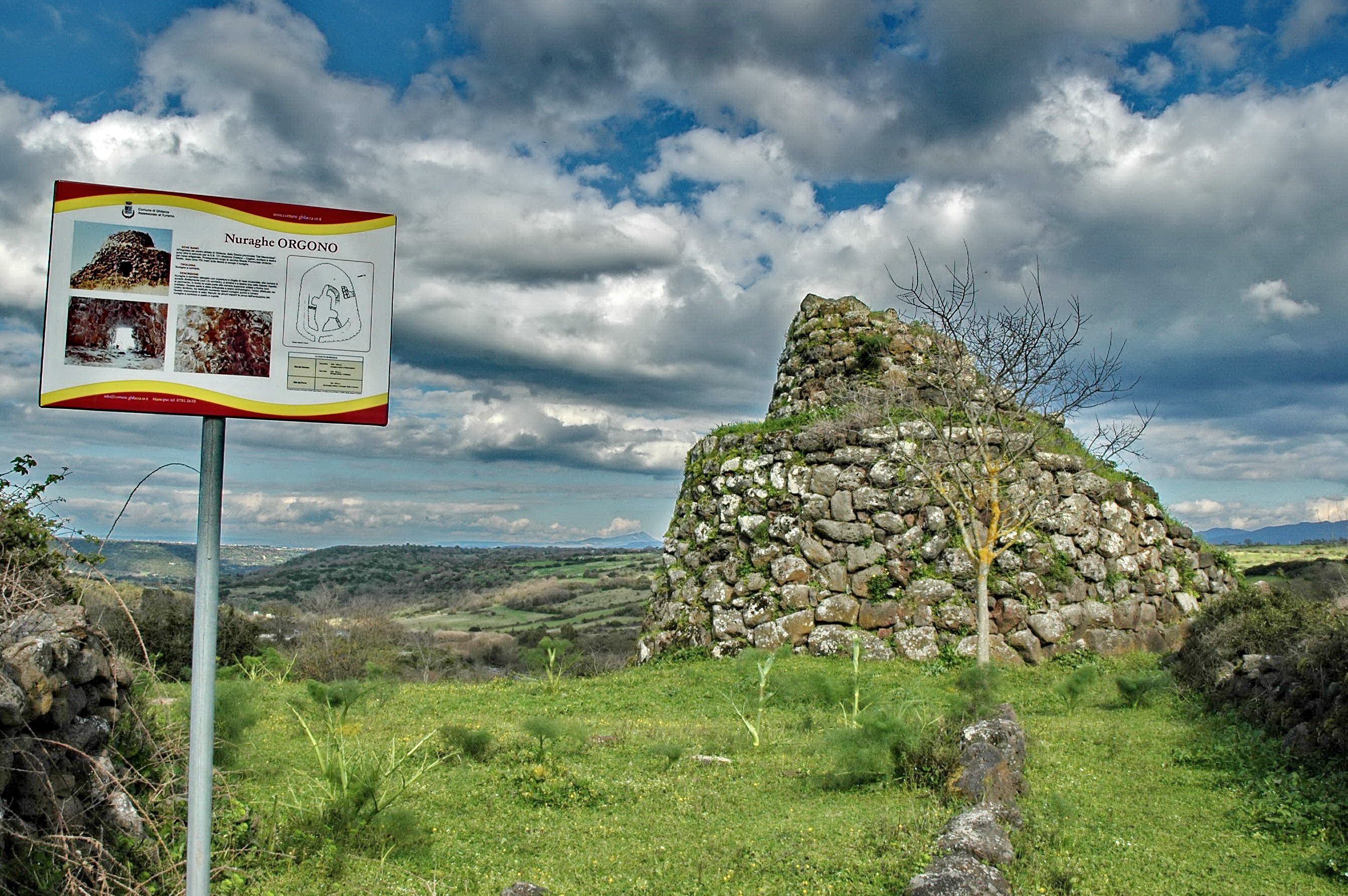 Nuraghe Orgono - MIBAC This is a photo of a monument which is part of cultural heritage of Italy.